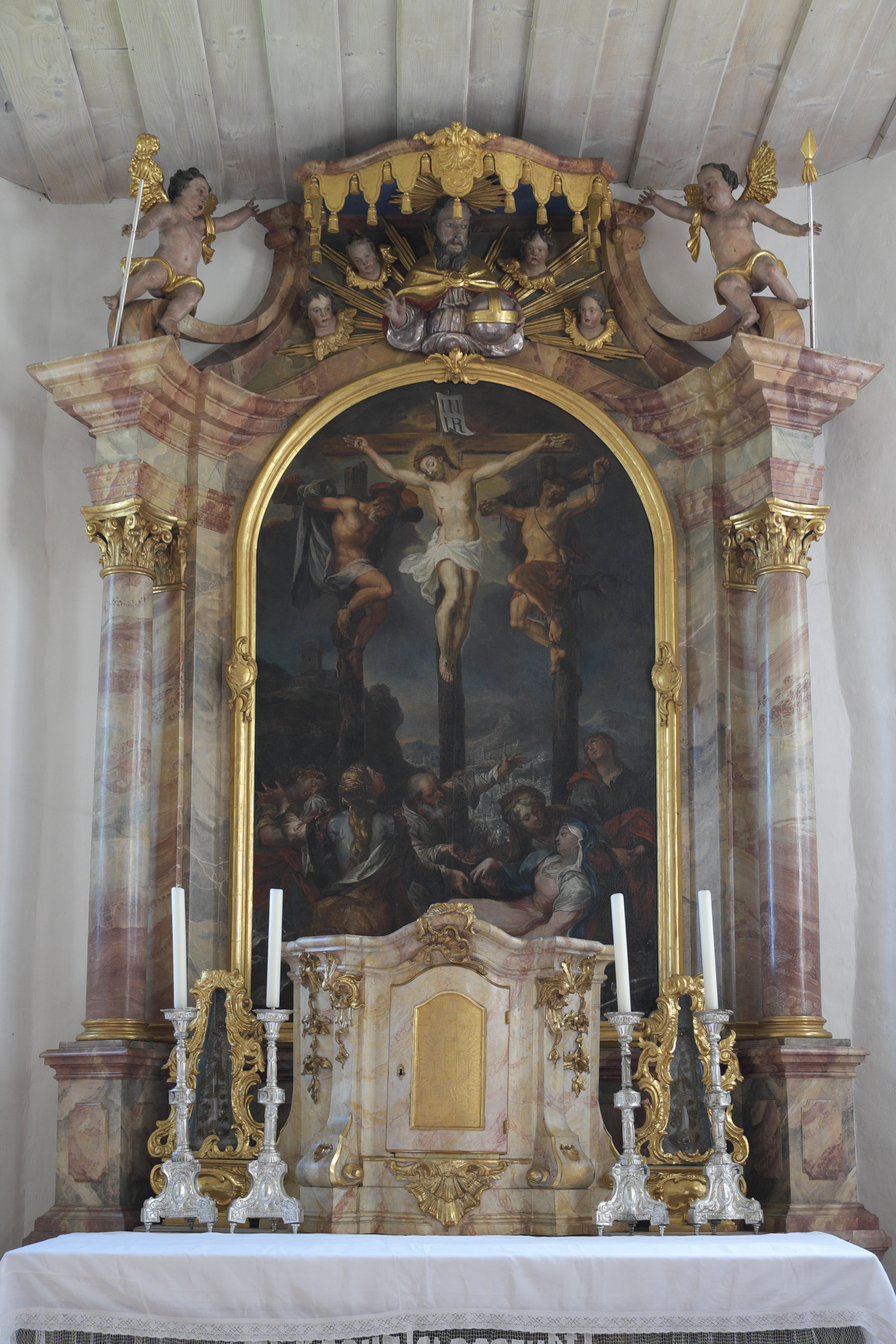 Katholische Filialkirche St. Maria (Maria Himmelfahrt) in Bergkirchen (Jesenwang) im Landkreis Fürstenfeldbruck (Bayern/Deutschland), Hauptaltar, Gemälde von Johann Rieger (Maler); Darstellung: Kreuzigung Christi